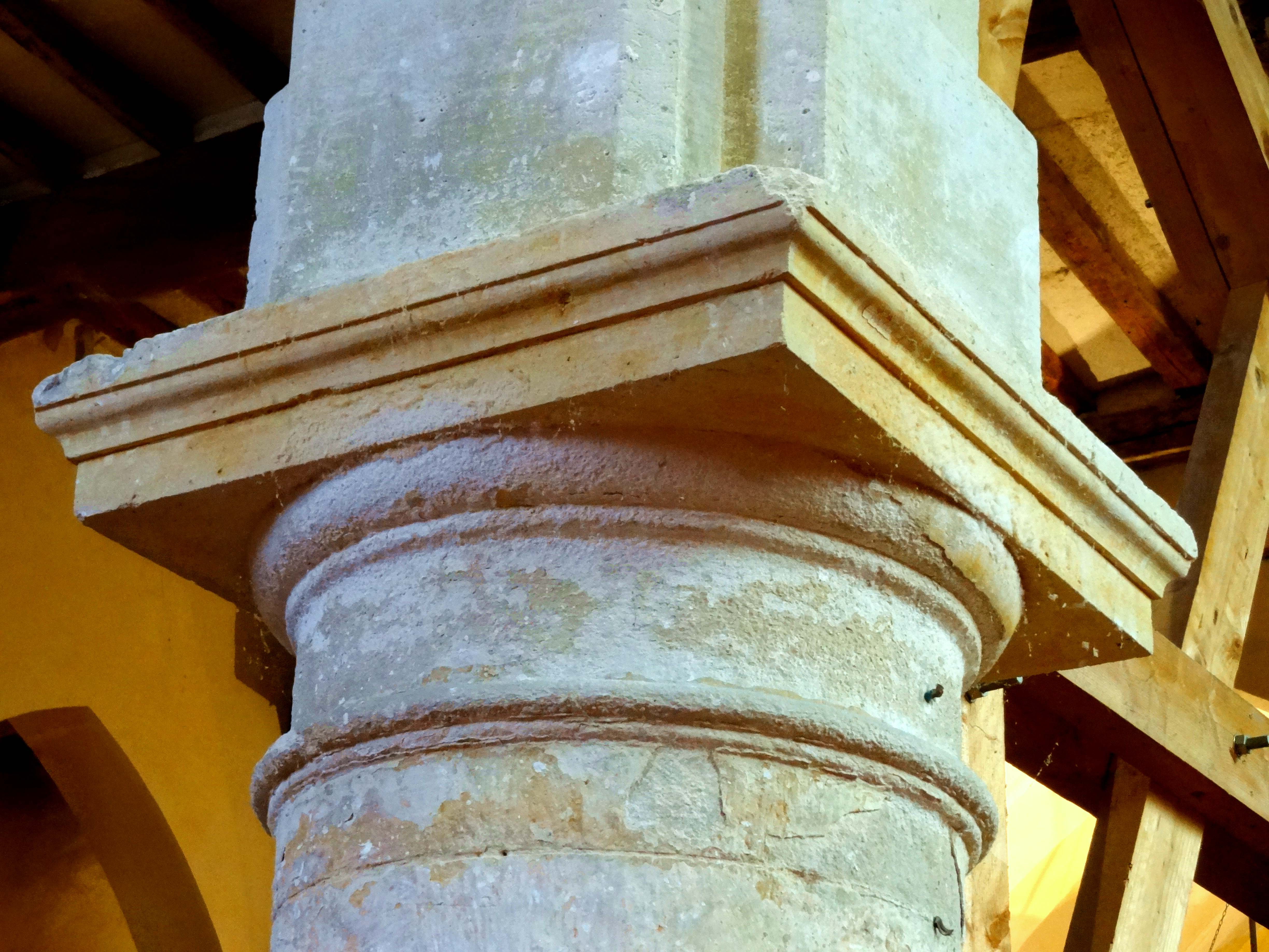 Chapiteau de l'église - voir titre.